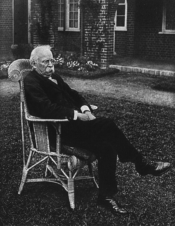 Juni 1926, Ebenezer Howard (1850–1928) Stadtplaner, Erfinder der Gartenstadt